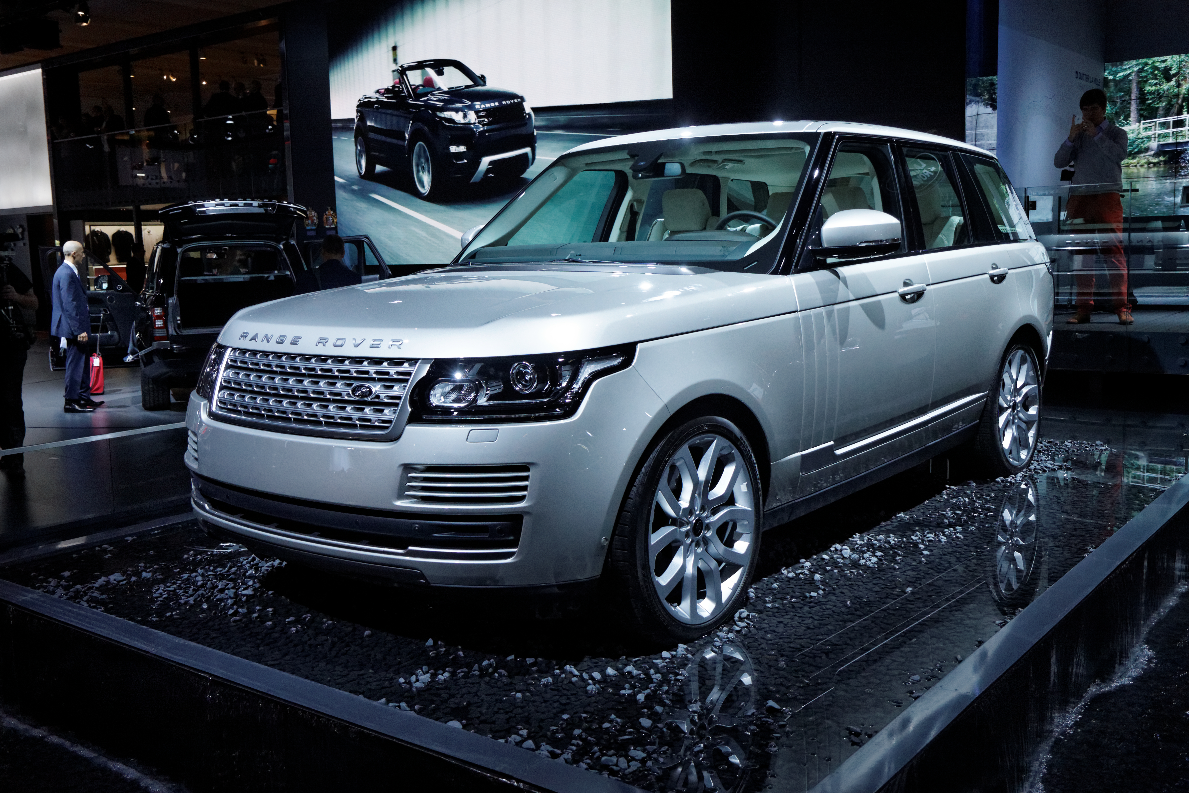 Une Land Rover Range Rover présentée lors du Mondial de l'automobile de Paris 2012.